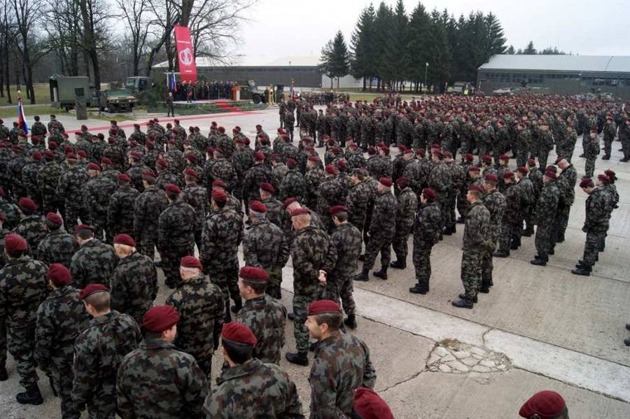 Slovesnost ob dnevu 1. Brigade slovenske vojske